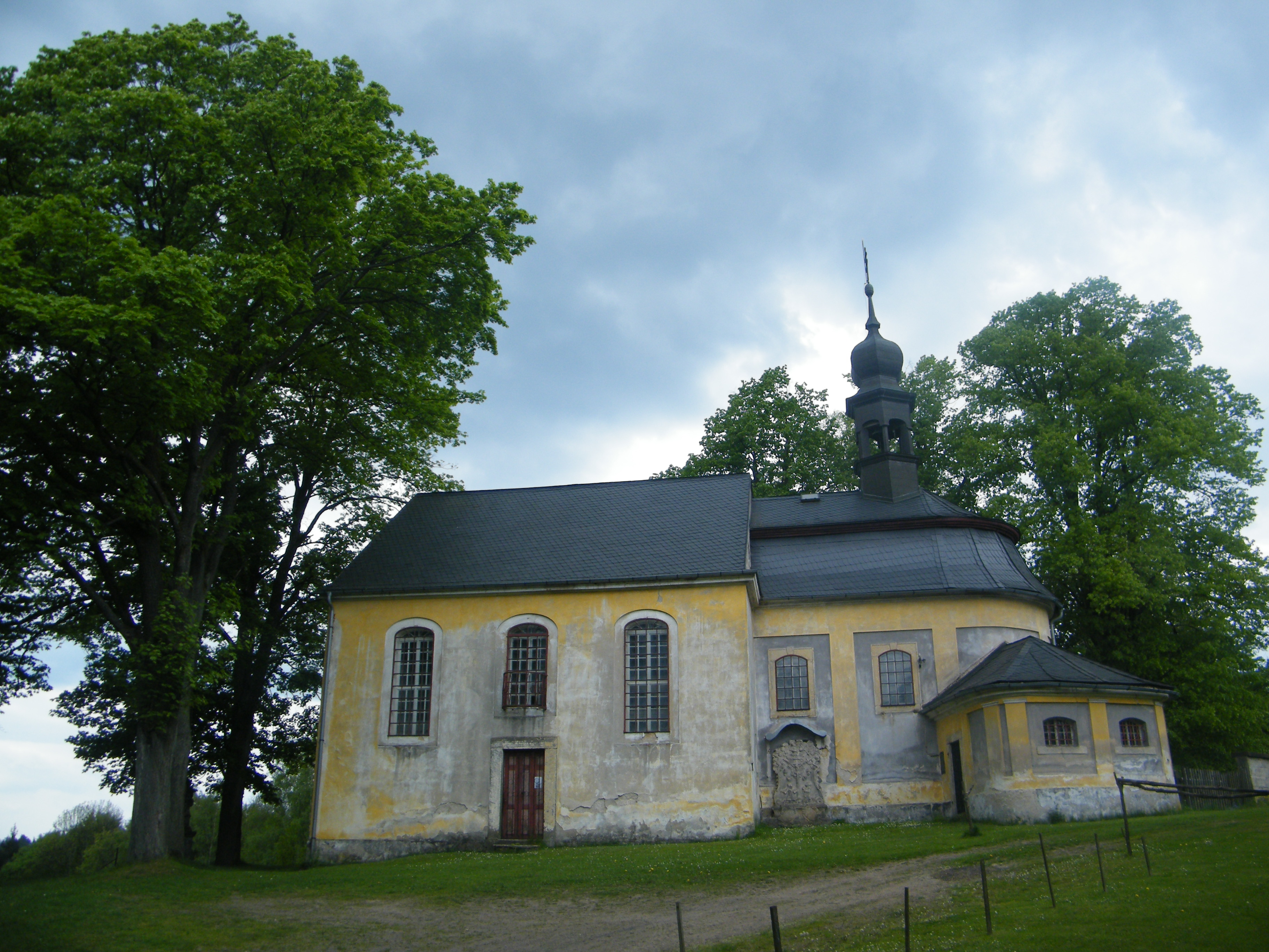 Kostel Panny Marie Sněžné na Sněžné, Krásná Lípa